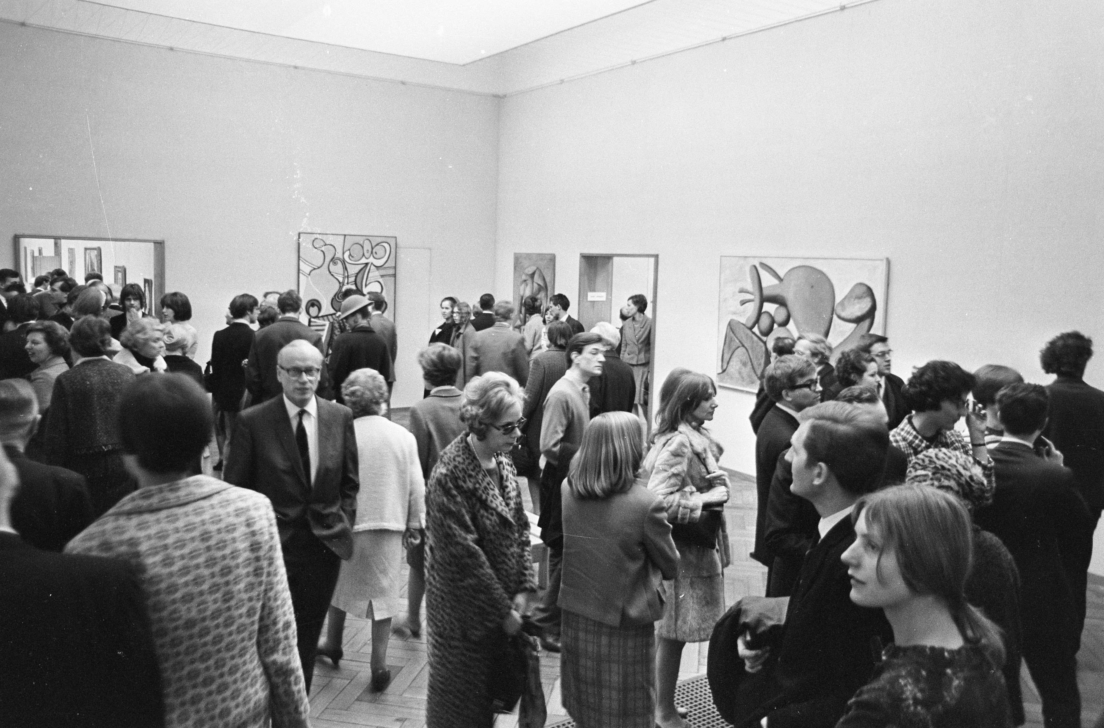 Collectie / Archief : Fotocollectie Anefo Reportage / Serie : [ onbekend ] Beschrijving : Picasso-tentoonstelling in de rij voor het Stedelijk Museum, drukte in museum Datum : 4 maart 1967 Trefwoorden : musea Persoonsnaam : Picasso, Pablo Fotograaf : Nijs, Jac. de / Anefo Auteursrechthebbende : Nationaal Archief Materiaalsoort : Negatief (zwart/wit) Nummer archiefinventaris : bekijk toegang 2.24.01.05 Bestanddeelnummer : 920-1372